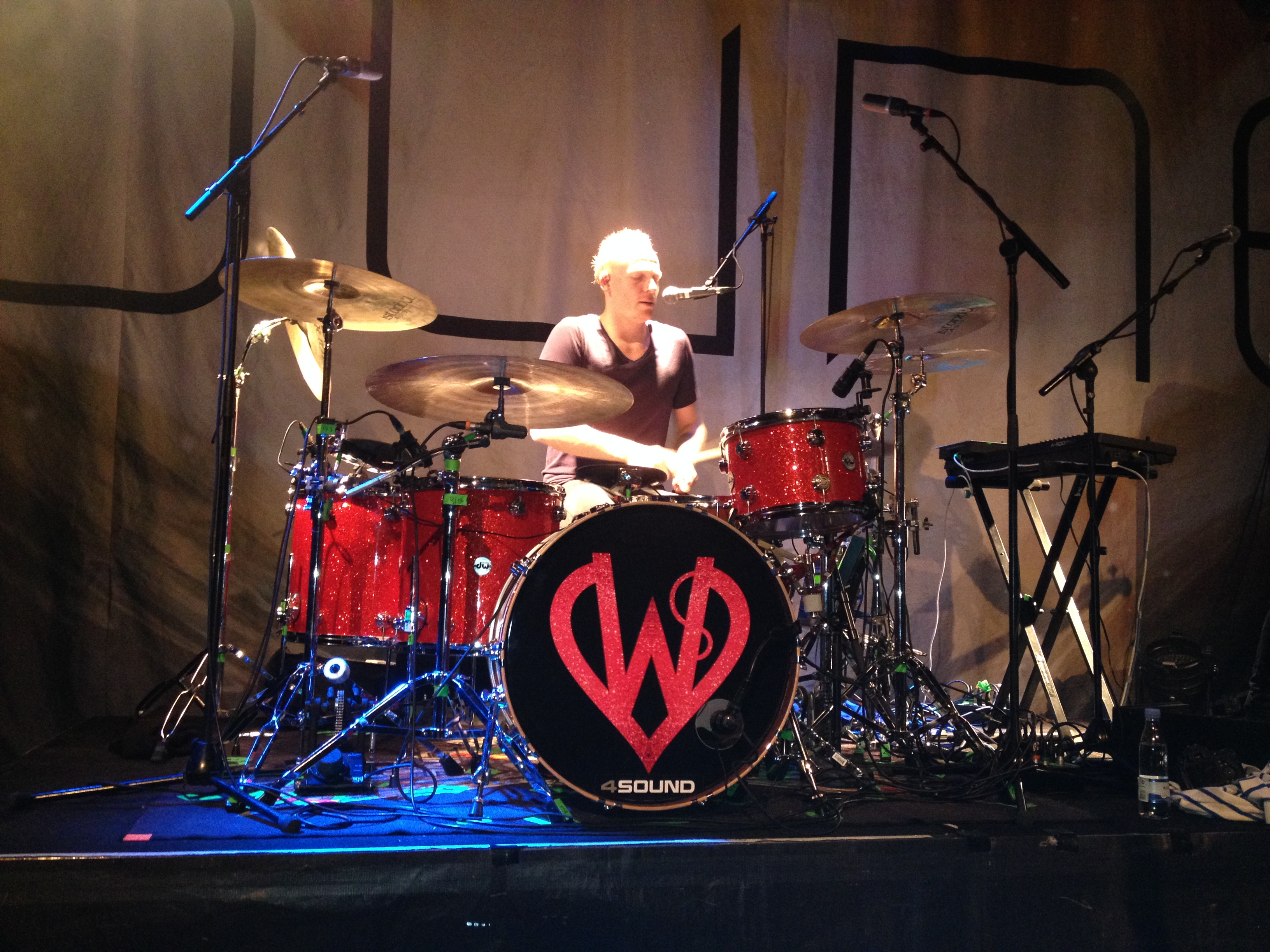 Trommeslager Morten Hellborn under Dúnés Wild Hearts Tour. Her ved koncert på Fermaten i Herning.